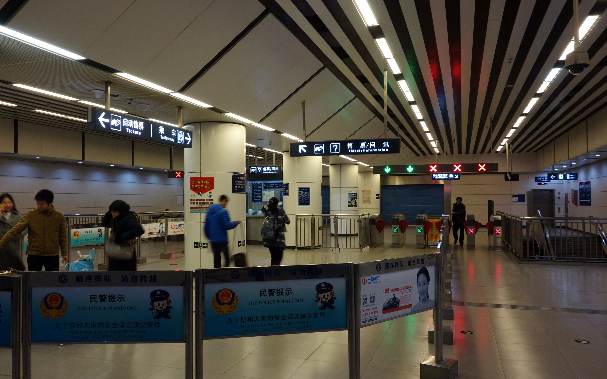 北京地铁10号线苏州街站分体式站厅